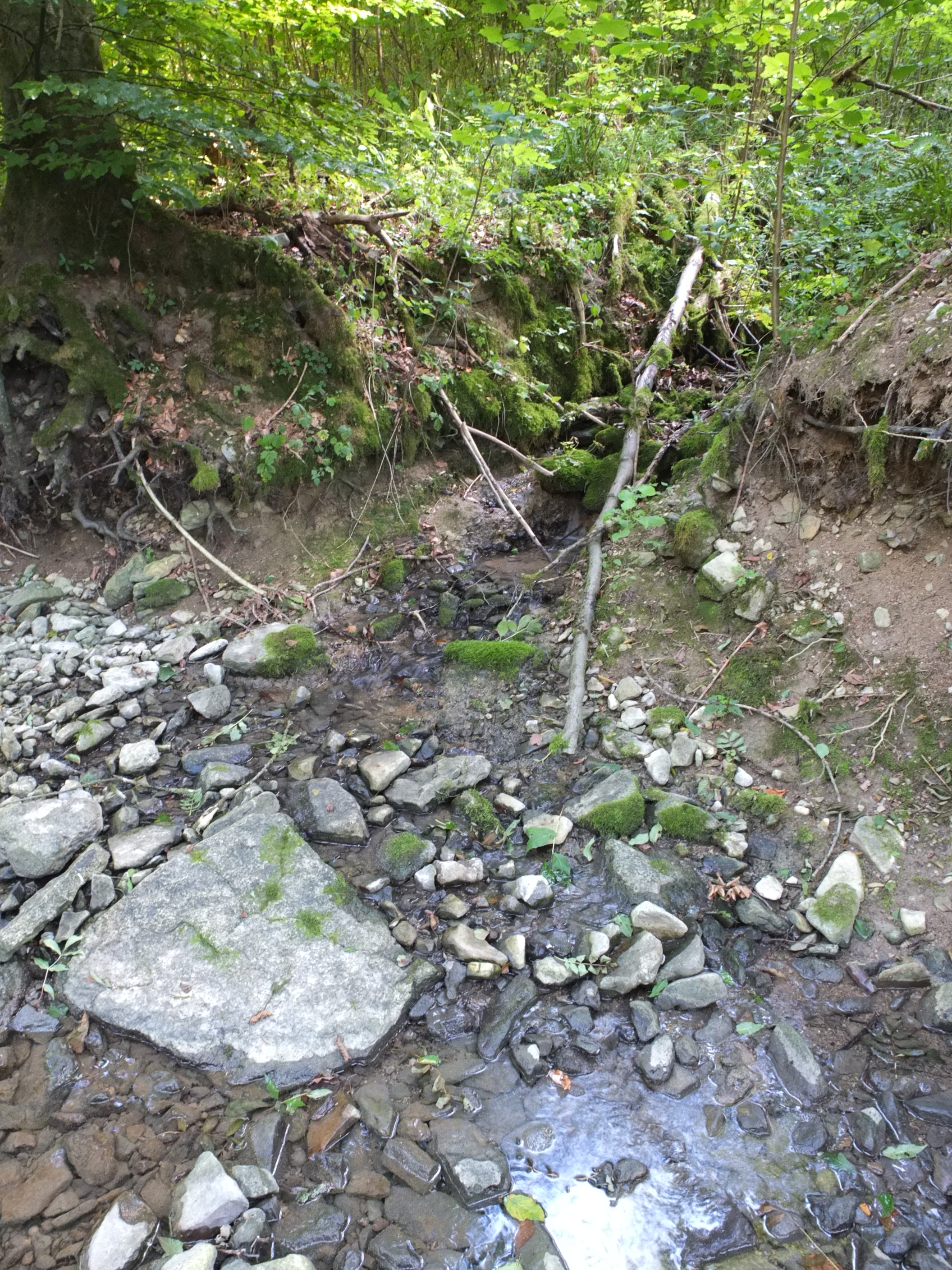 Der kleine Bachlauf der Erhardsquelle mündet in den Künsbach.